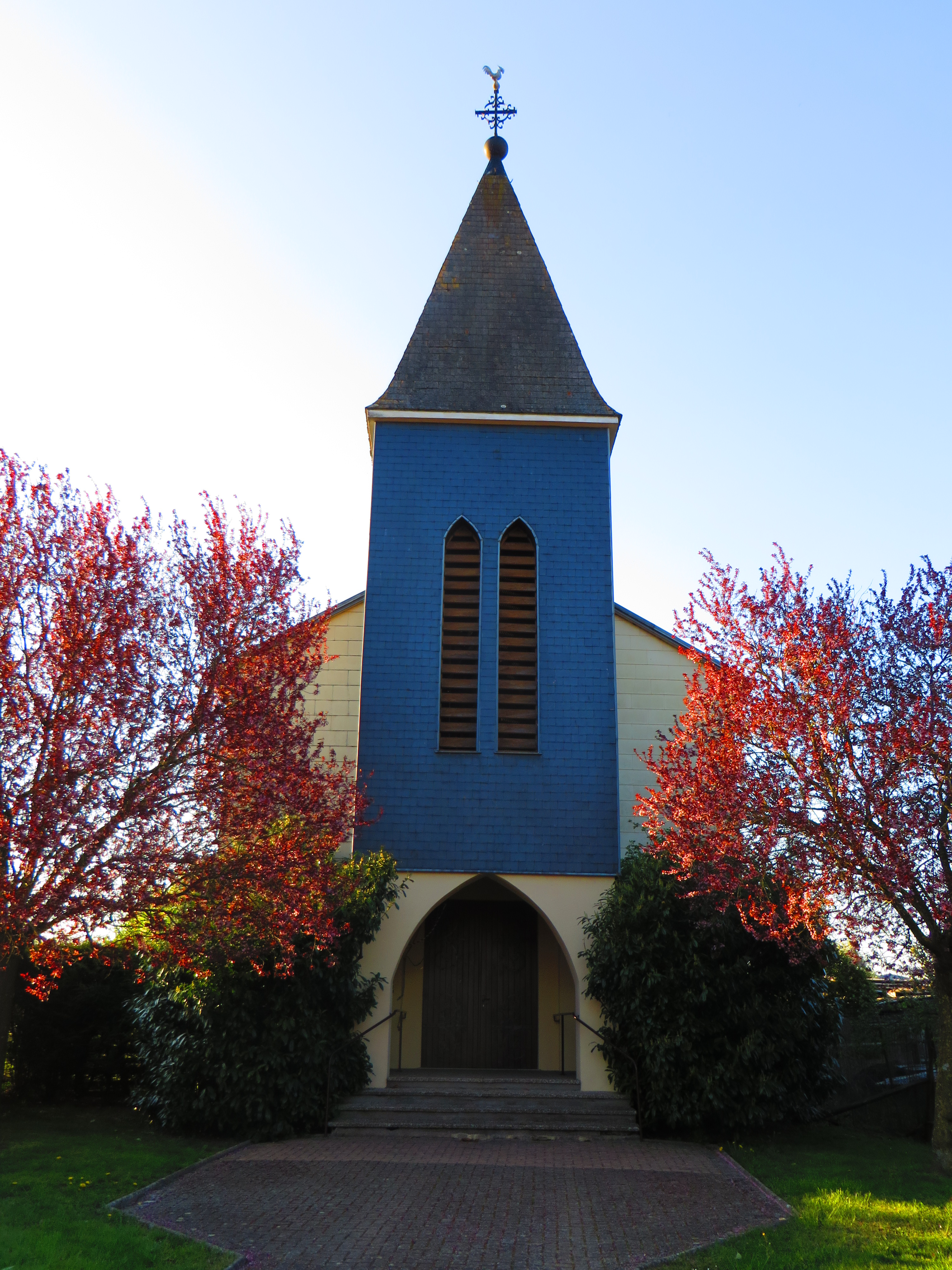 Hemering eglise